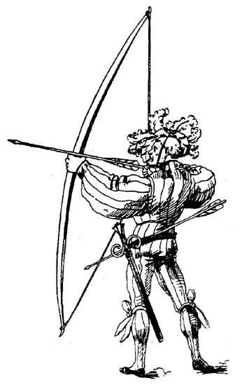 Иллюстрация из "Энциклопедии оружия" Вендалена Бехайма.